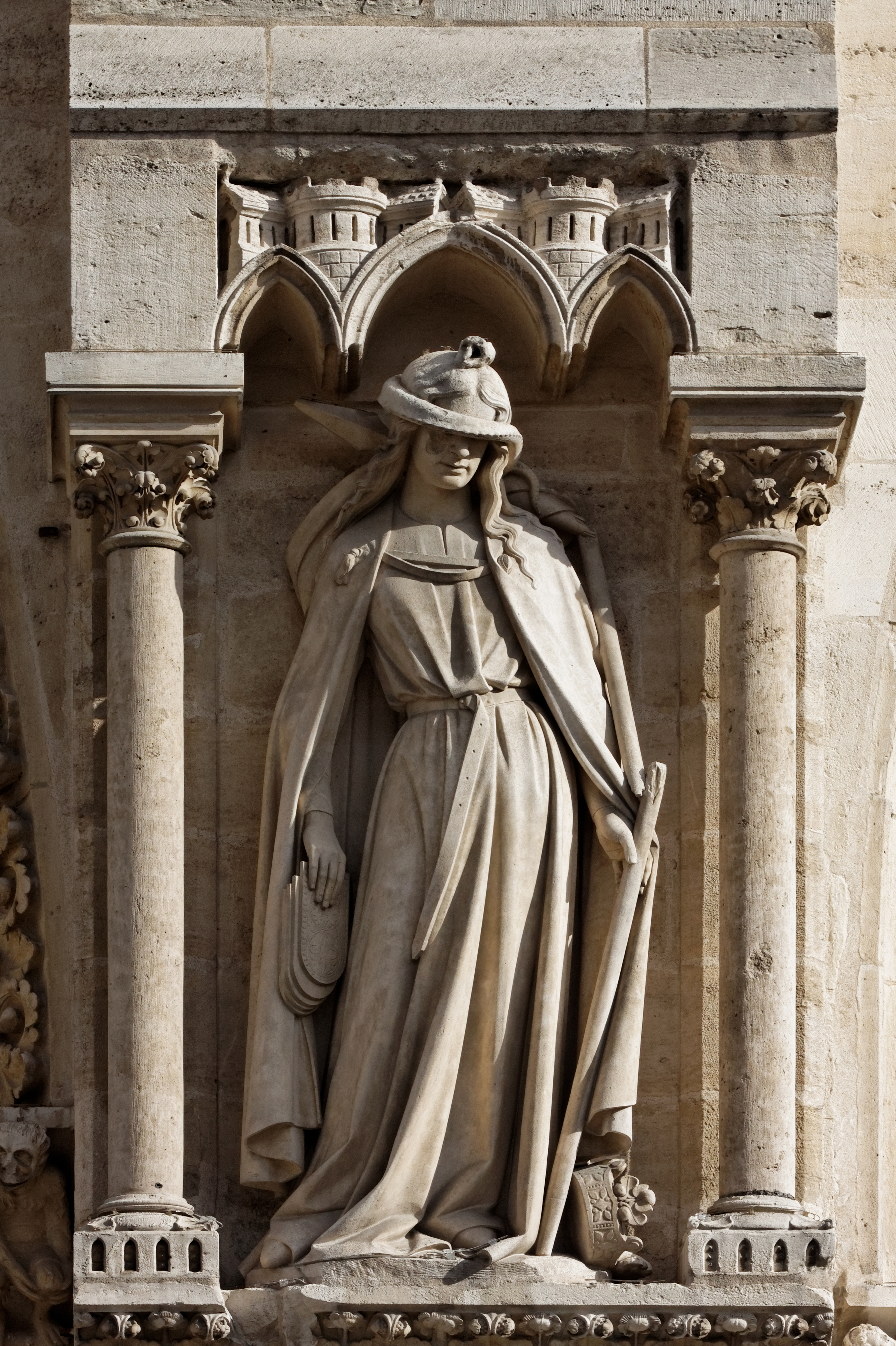 Synagoga, statue allégorique de pierre sur un contrefort de la façade ouest de la cathédrale Notre-Dame de Paris.